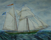 Foto på en tavla föreställande skeppet Malin Margareta från Landskrona, kapten Carl Larsson, målad av mig själv.